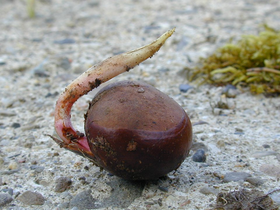 Keimende Rosskastanie